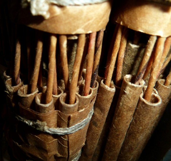 Kabelmuffe aus Blei (Bleimuffe) zum Verbinden von Papierkabel mit Isolierröhrchen